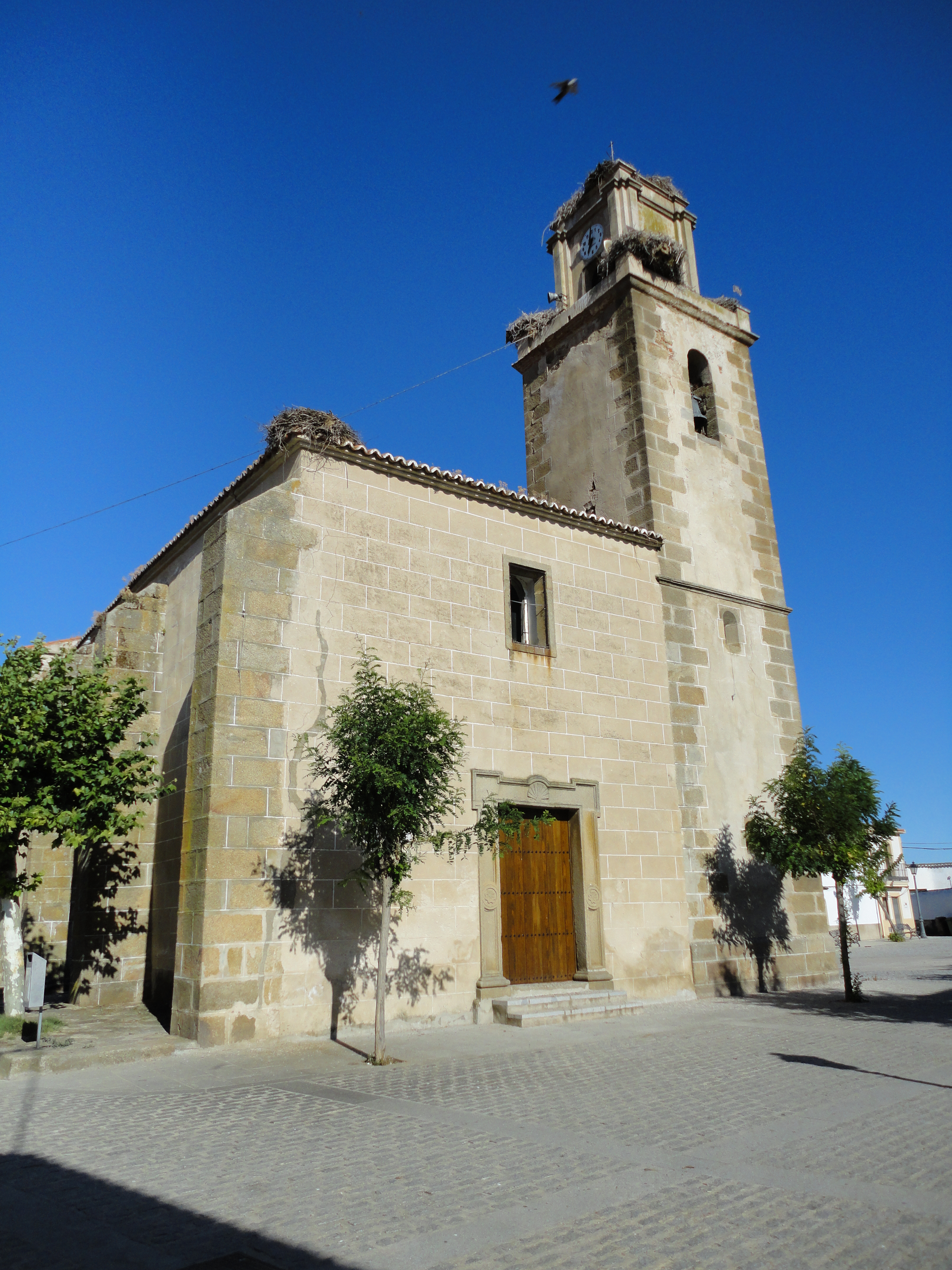 Iglesia parroquial de Villa del Rey, provincia de Cáceres, España.